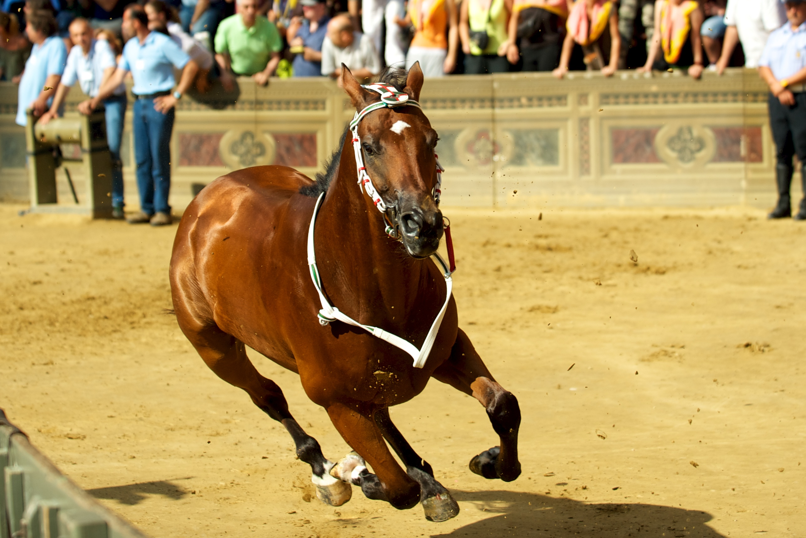 Cavallo scosso alla quarta prova del Palio di Siena di luglio 2011.